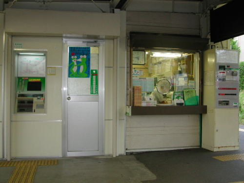 JR新潟大学前駅・改札口付近（現在は改修されている）